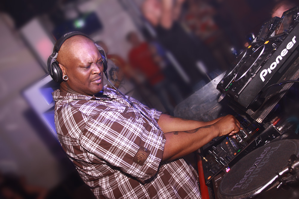 DJ Rush bei einem DJ-Set in der legendären Discothek Airport, Würzburg